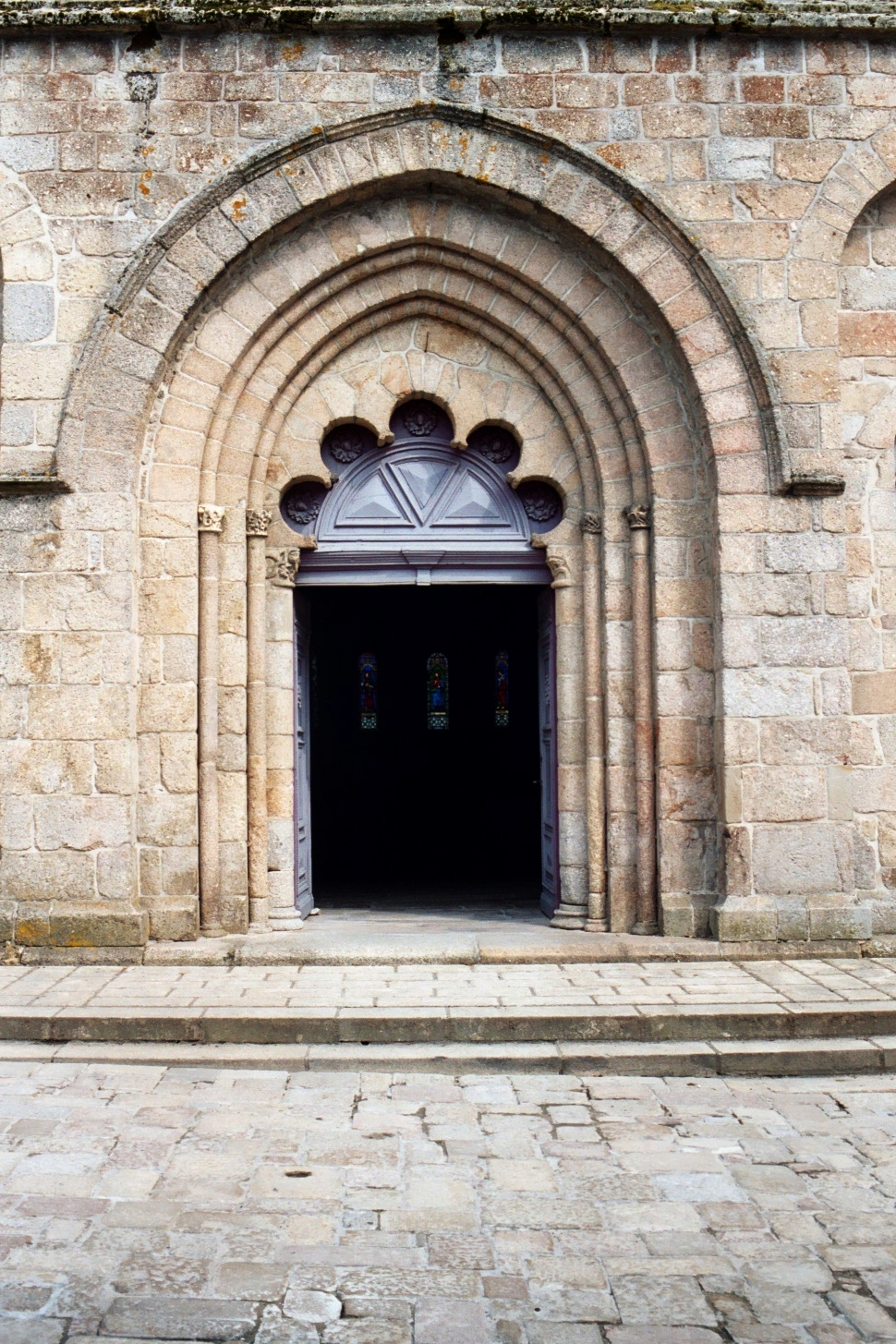 Meymac - Portail polylobé